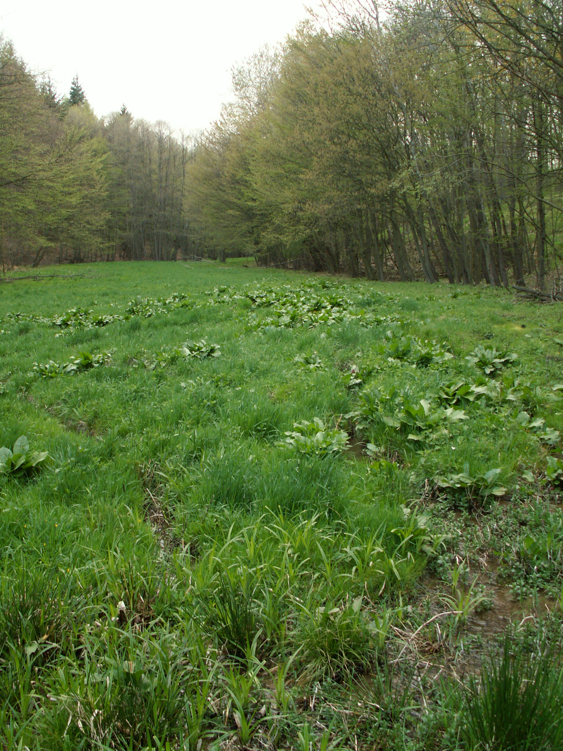 Pohled proti směru toku v podmáčené nivní louce přírodní památky Augšperský potok, kde se voda větví v množství potůčků. Hlavní tok jde podél řady stromů vpravo. V pozadí je konec louky, kde potok vytéká z lesa.